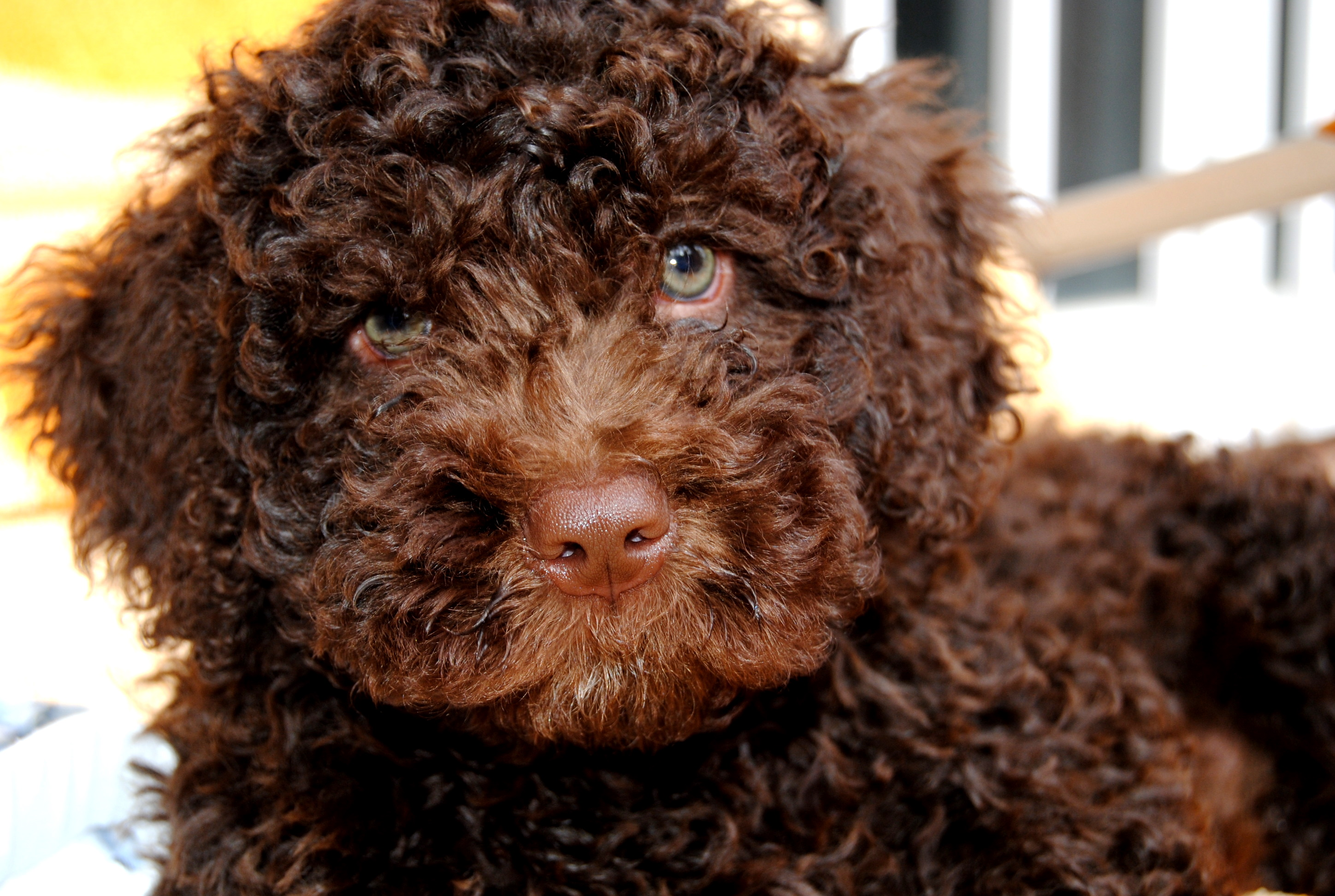 Ejemplar joven de Perro de Agua Español, color marrón